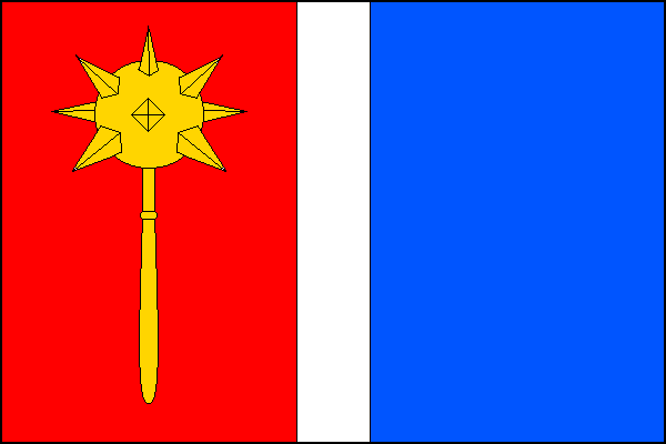 vlajka, Přestavlky, okres Přerov